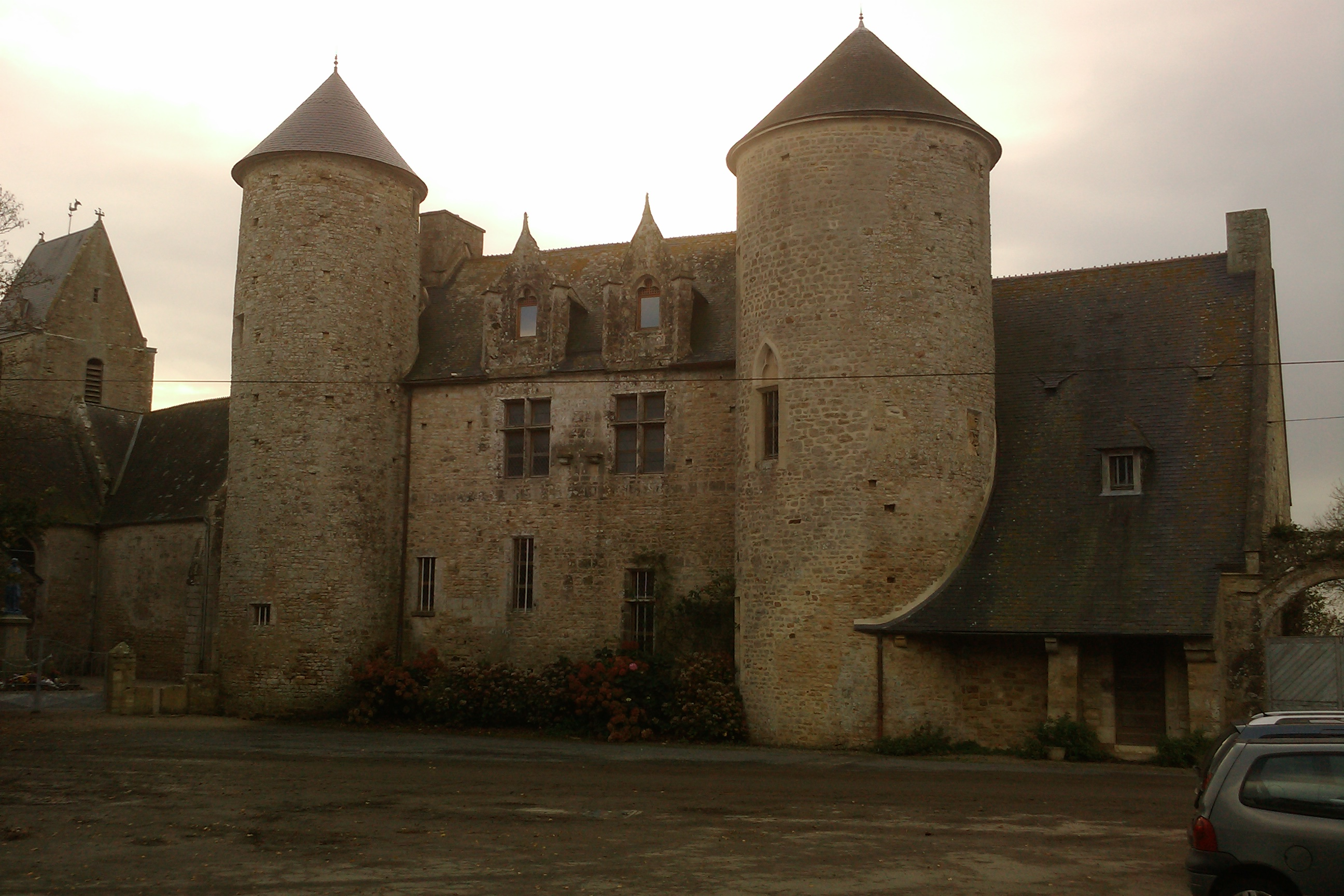 Presbytère d'Étienville (5e siècle ; 16e siècle)